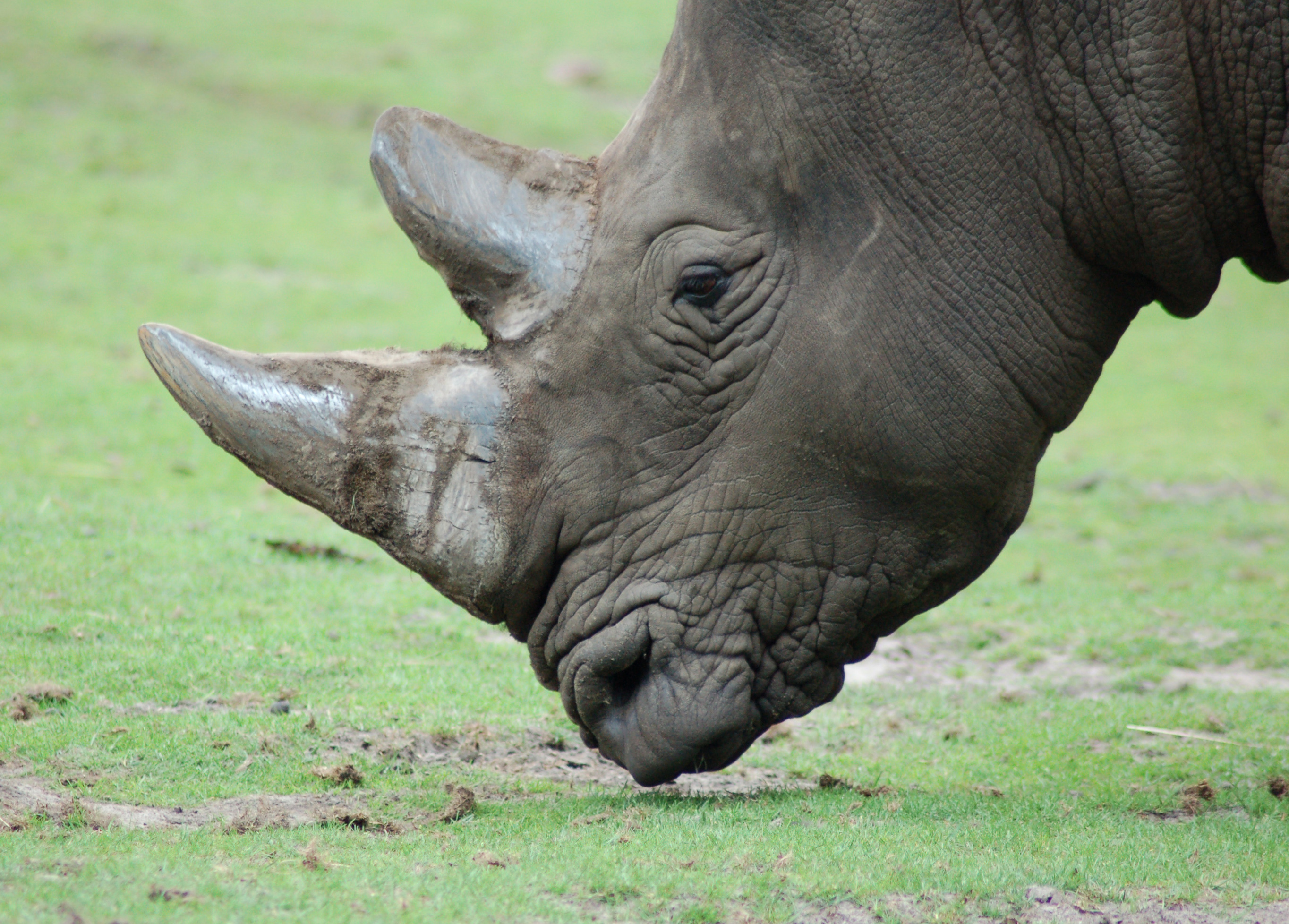 Rhinoceros